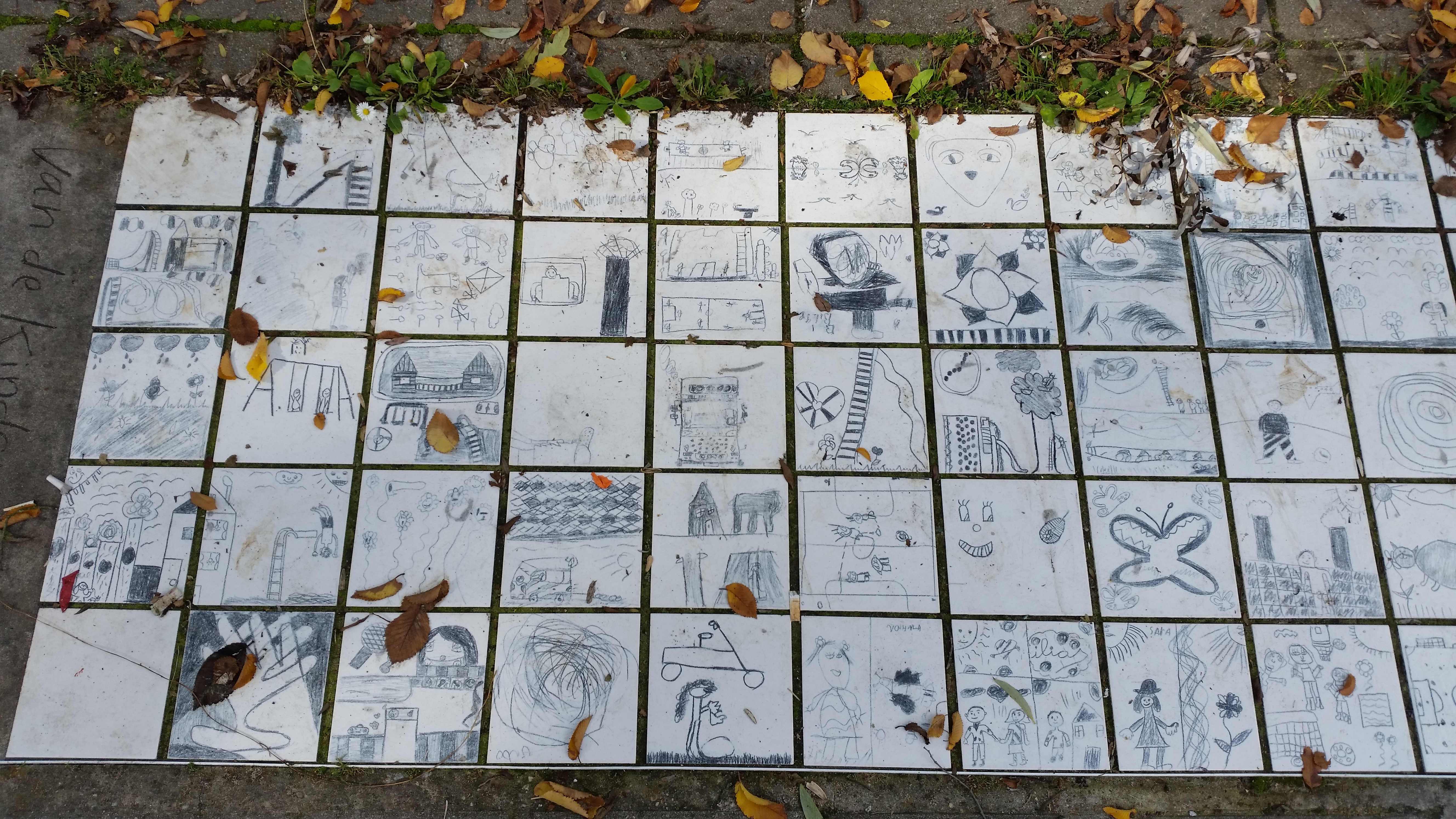 Tegelpad gemaakt door buurtkinderen in het Gerbrandypark.